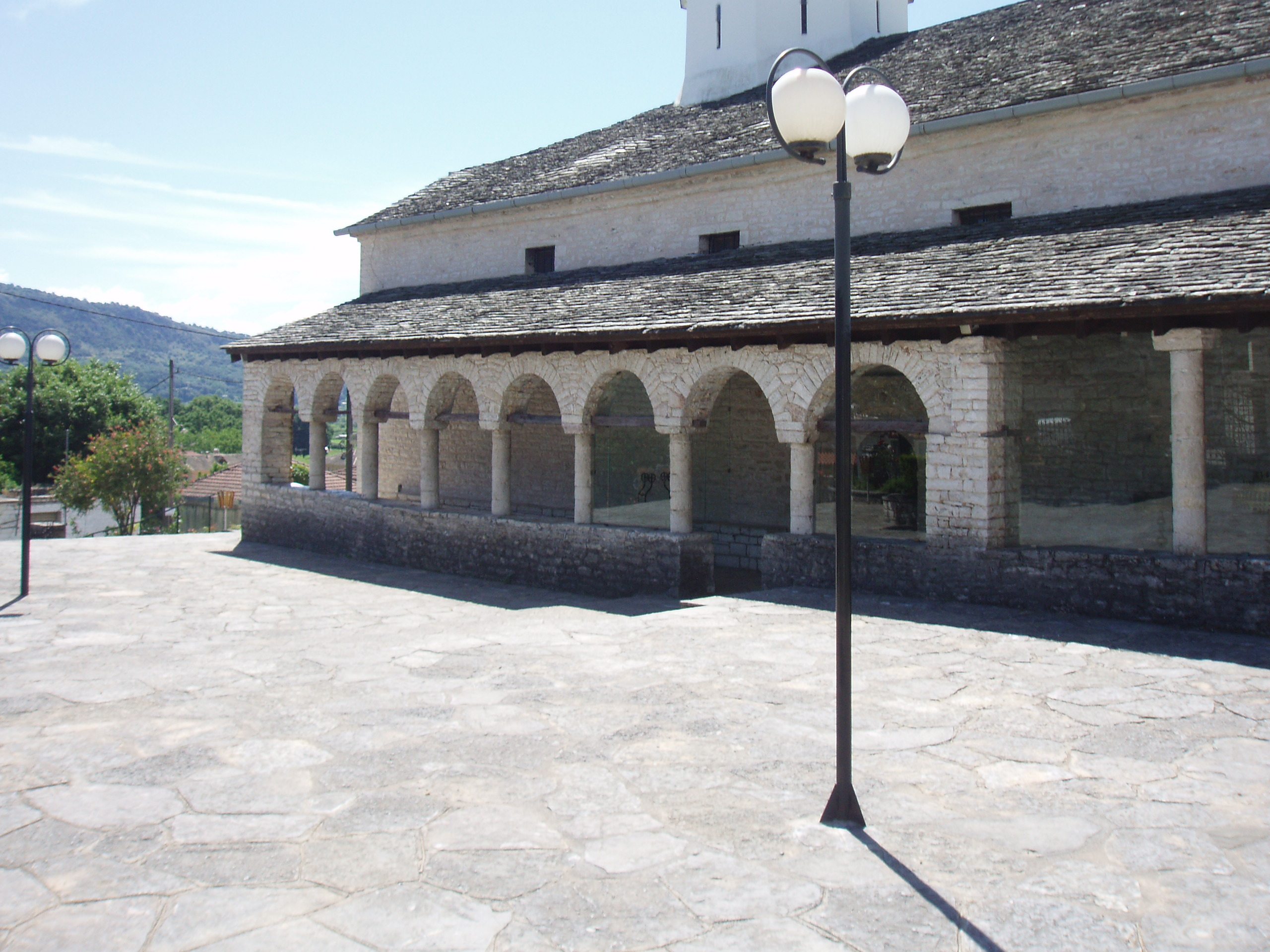 Η Παναγία η Λαμποβίτισσα στο Θεσπρωτικό Πρεβέζης